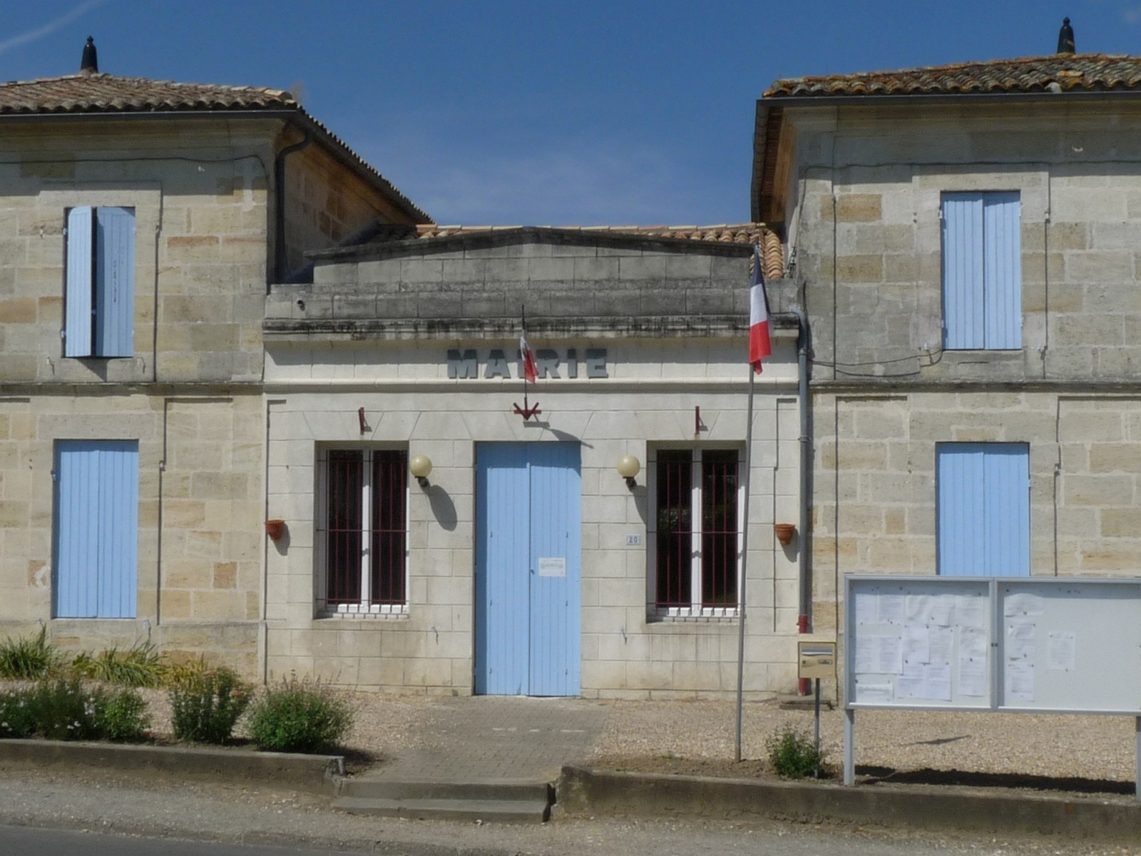 Mairie de St-Ciers-d'Abzac, Gironde, France